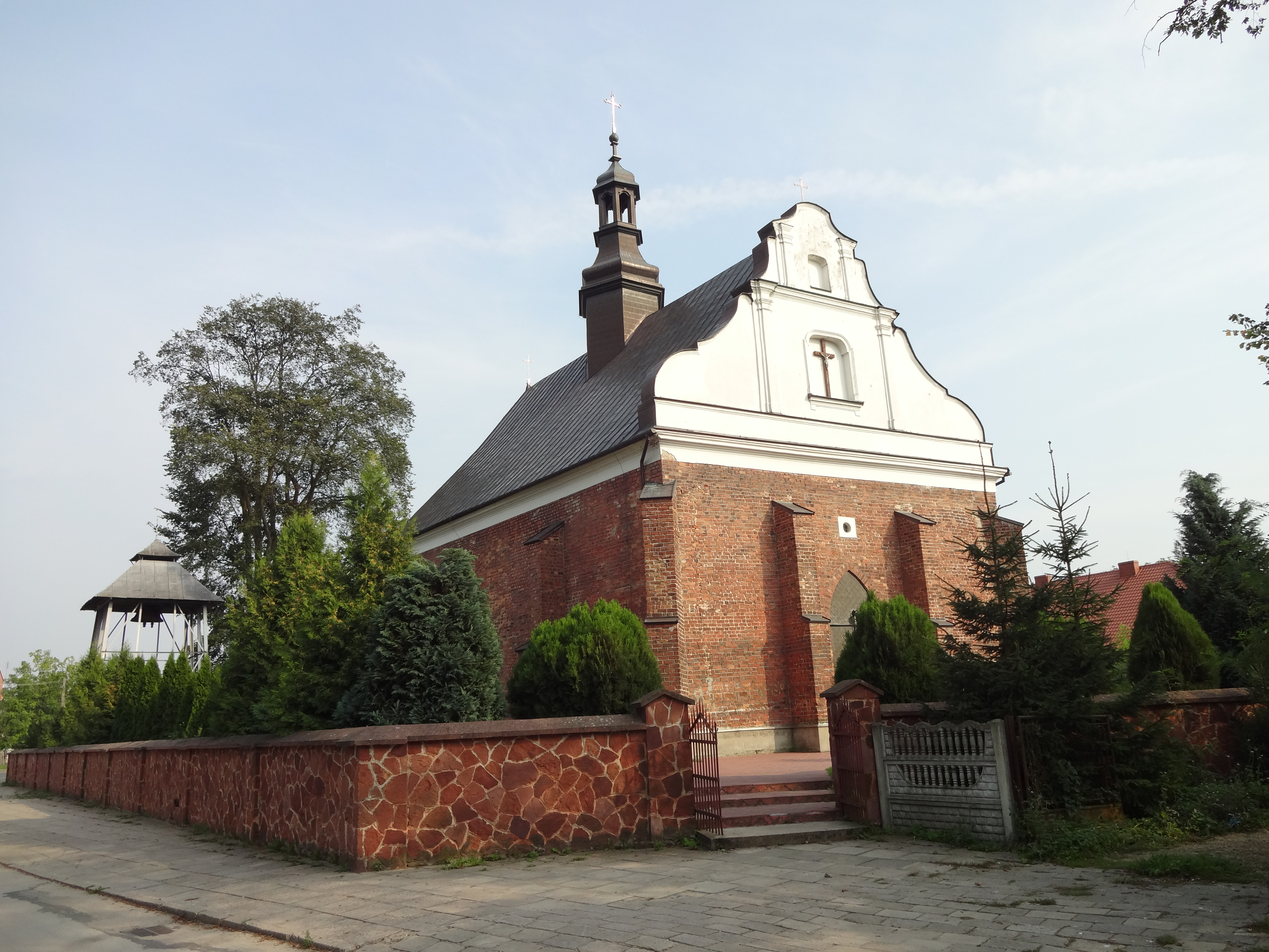 Secemin ul. Kościelna 3 - rzymskokatolicki kościół parafialny pw. św. Katarzyny i Jana Ewangelisty, z najbliższym otoczeniem w granicach ogrodzenia, 1402, 1556-1558, 1 poł. XVIII w.